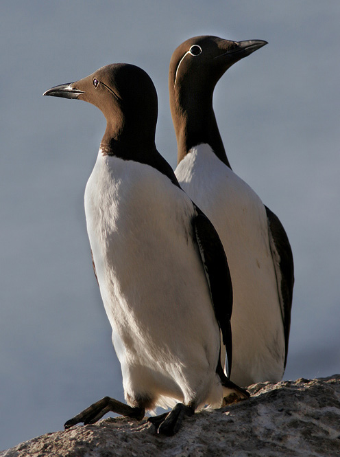 Lomvi, Guillemot, Uria aalge.